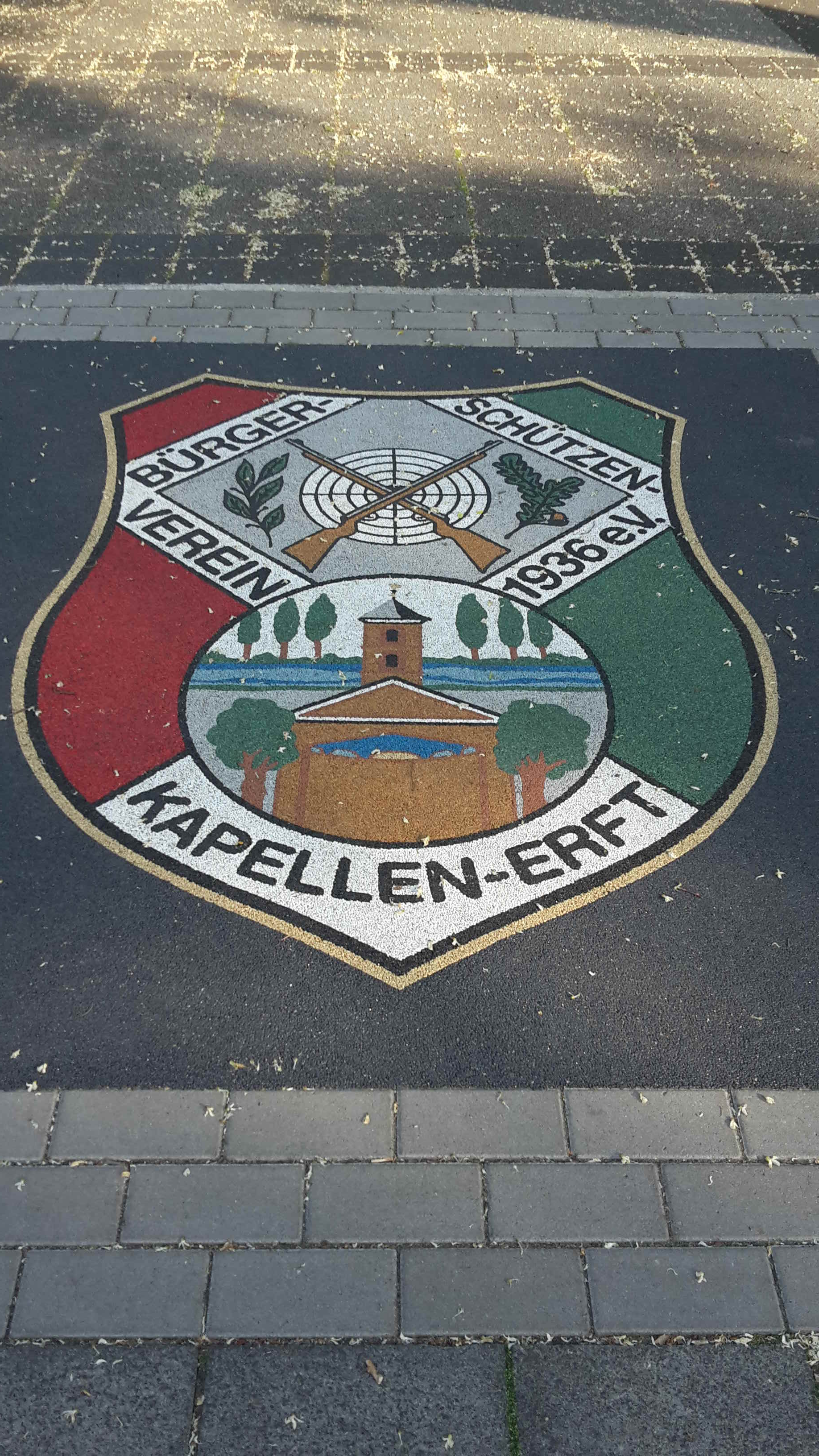 Logo des Bürger-Schützen-Vereins an der kath. Kirche